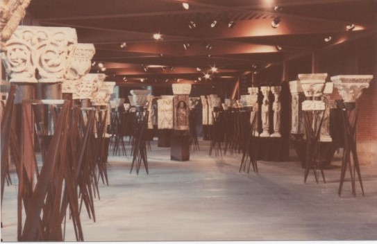 Supports de Pierre Debeaux pour les sculptures romanes